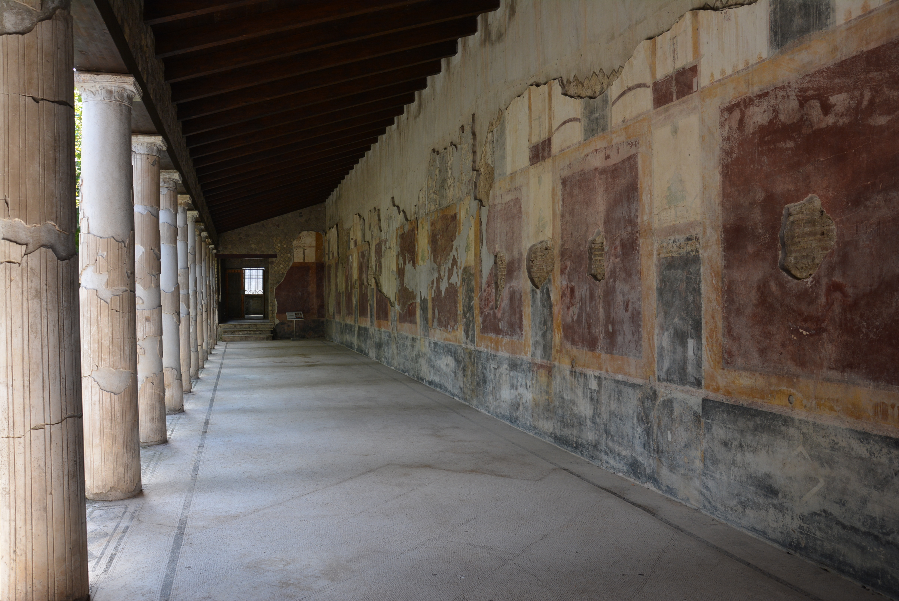 Villa San Marco, Stabia - MIBAC This is a photo of a monument which is part of cultural heritage of Italy.